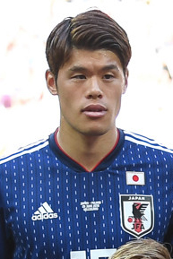 Япония проиграла Польше, но вышла в плей-офф